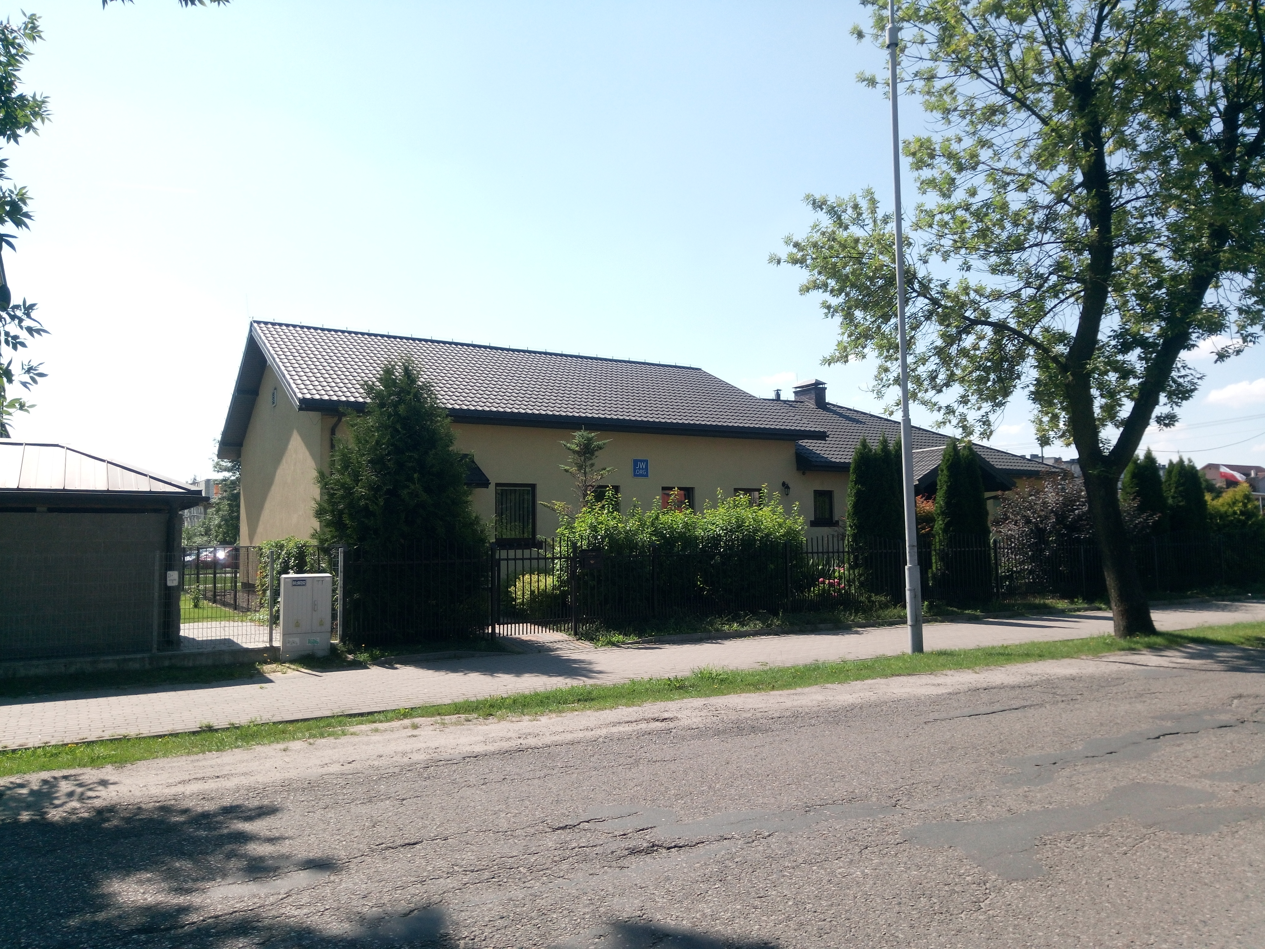 Сведкі Іеговы